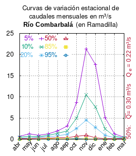 Curvas de variación estacional del río Combarbalá en Ramadilla. # Dirección General de Aguas # Diagnóstico y clasificación de los cursos y cuerpos de agua según objetivos de calidad. Cuenca del río Limarí. # Santiago de Chile # Ministerio de Obras Públicas (Chile) # 2004 # url: # urlarchivo: # Tabla 4.13: Río Combarbalá en Ramadilla, p.57 mes 5% 10% 20% 50% 85% 95% abr 0.738 0.450 0.247 0.079 0.019 0.008 may 1.304 0.680 0.311 0.075 0.019 0.012 jun 0.888 0.628 0.410 0.173 0.049 0.015 jul 1.311 0.922 0.600 0.257 0.082 0.035 ago 2.009 1.331 0.808 0.311 0.096 0.048 sep 3.100 1.980 1.148 0.400 0.103 0.042 oct 8.593 4.978 2.570 0.726 0.153 0.061 nov 21.298 10.496 4.455 0.866 0.115 0.035 dic 17.672 7.654 2.779 0.399 0.037 0.009 ene 5.018 2.378 0.962 0.171 0.020 0.006 feb 1.239 0.701 0.351 0.094 0.018 0.007 mar 0.487 0.316 0.188 0.069 0.020 0.010 This plot was created with Gnuplot.